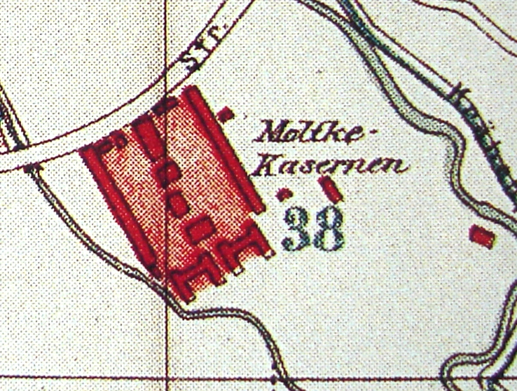 青岛毛奇兵营地图